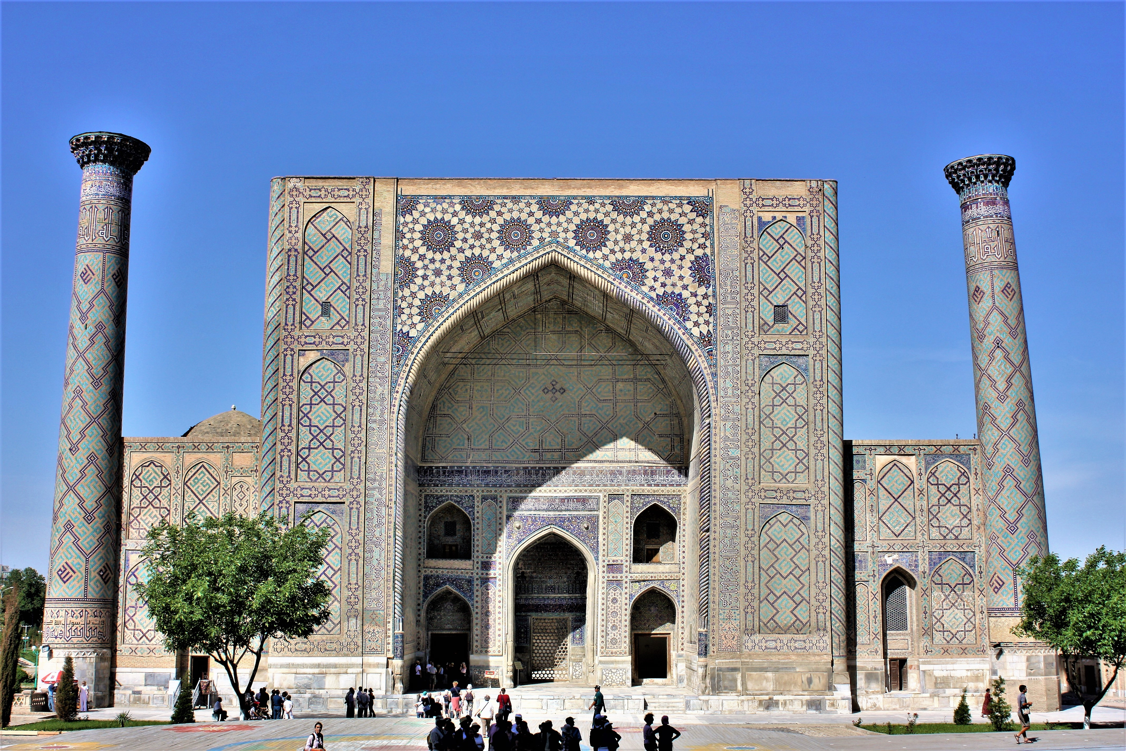 Samarkand, Registan: Ulugbek Medressa